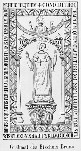 Reproduktion der Grabplatte von Bruno, Bischof von Minden.